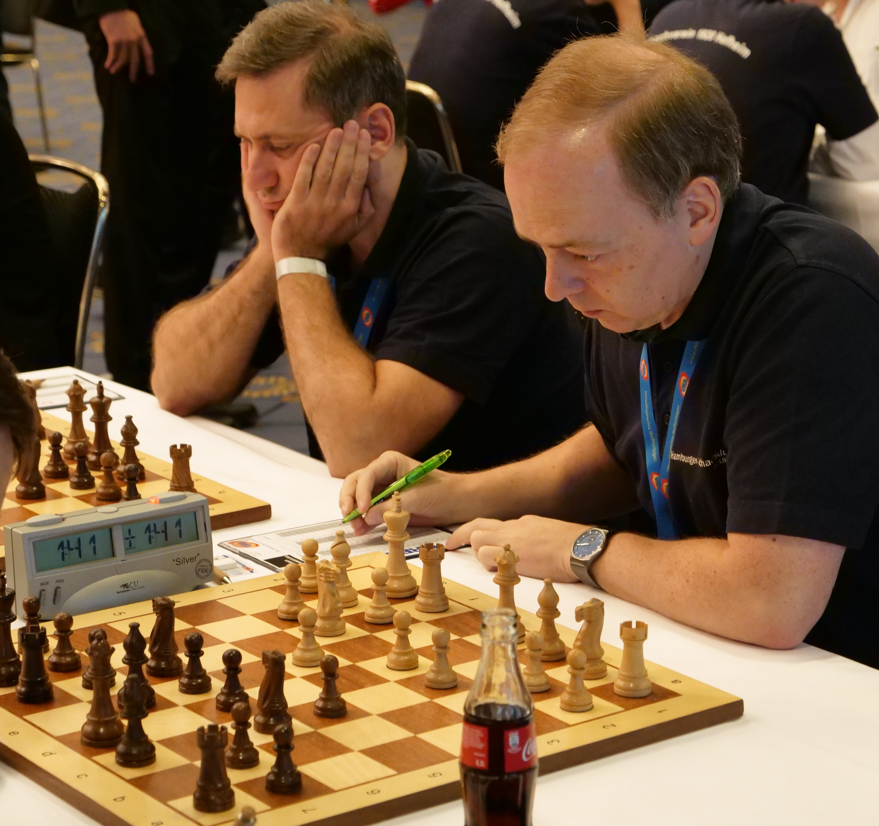 Heinemann und Rogenzenco in der Bundesliga-Endrunde 30-4-2018